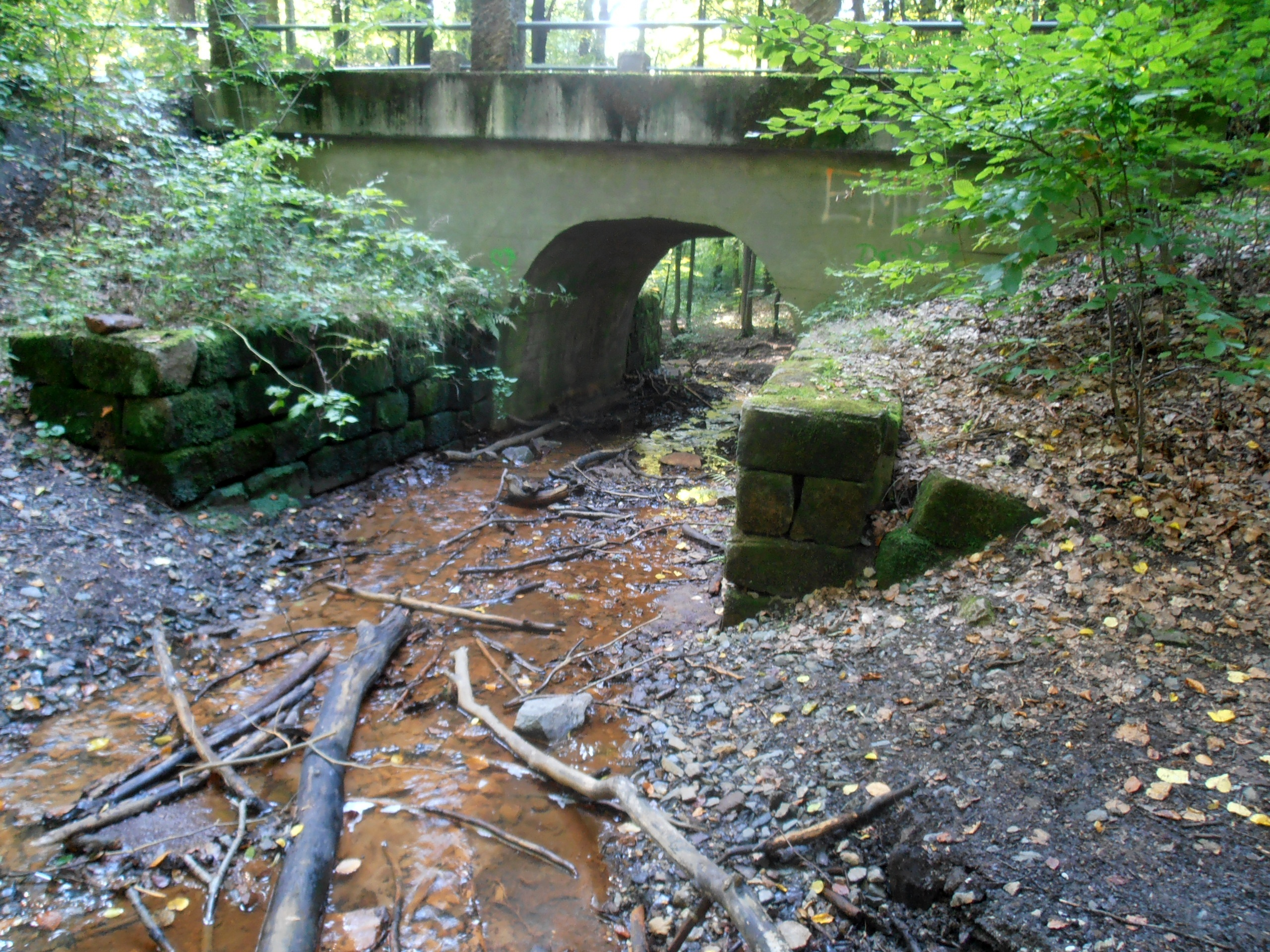 Mordgrundbach mit Stechgrundbrücke, Blickrichtung bachabwärts